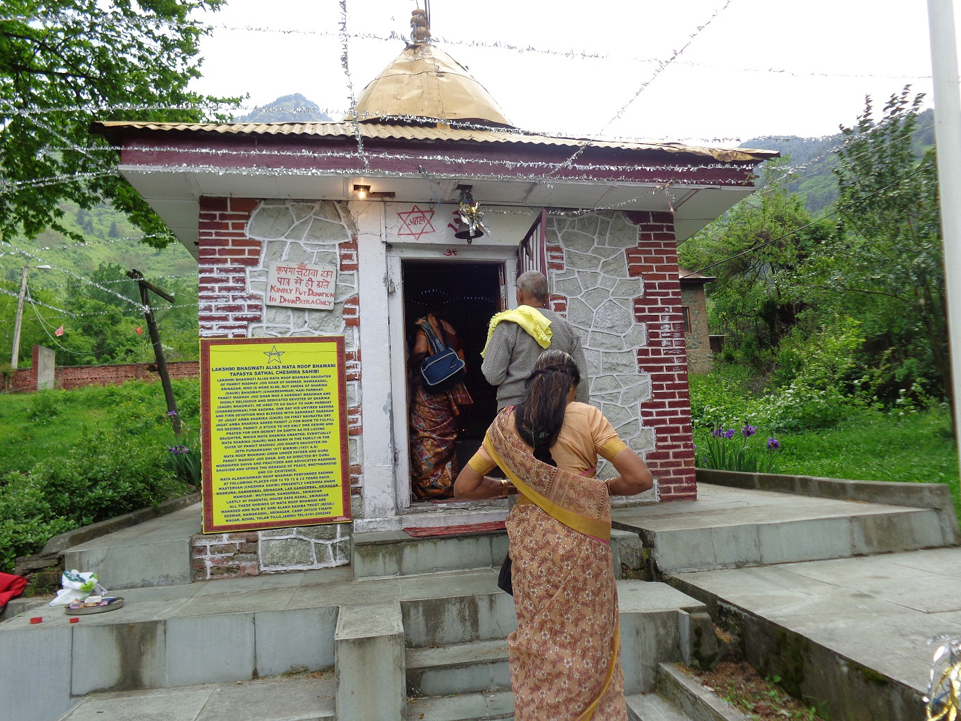 ശ്രീനഗർ രൂപ്ഭവാനി ക്ഷേത്രം മുൻ വശം